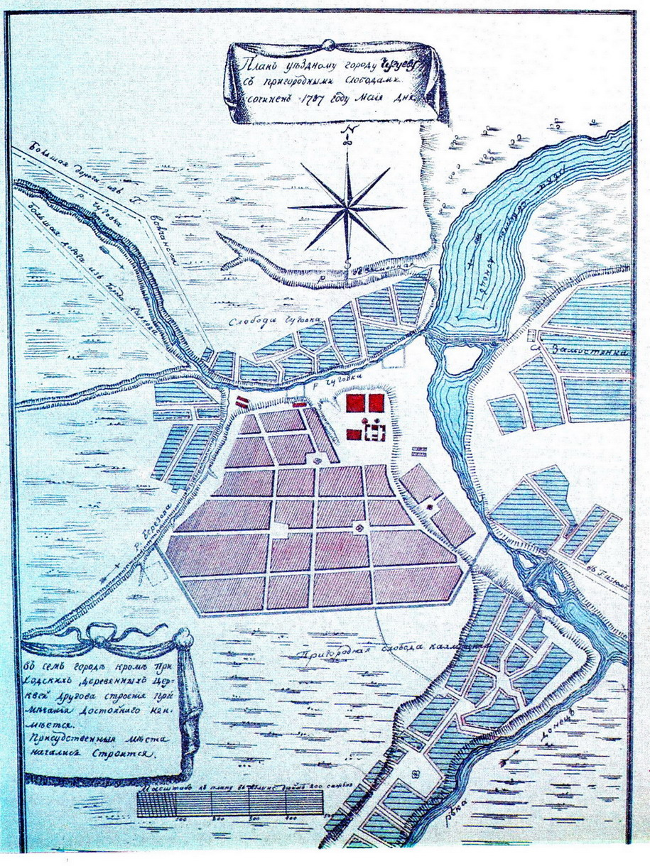 План города Чугуева Харьковского наместничества в "Топографическом описании Харьковского наместничества" 1787 года. Подпись: «План уездному городу Чугуеву с пригородными слободами сочинен 1787 году … Маия … Дня».